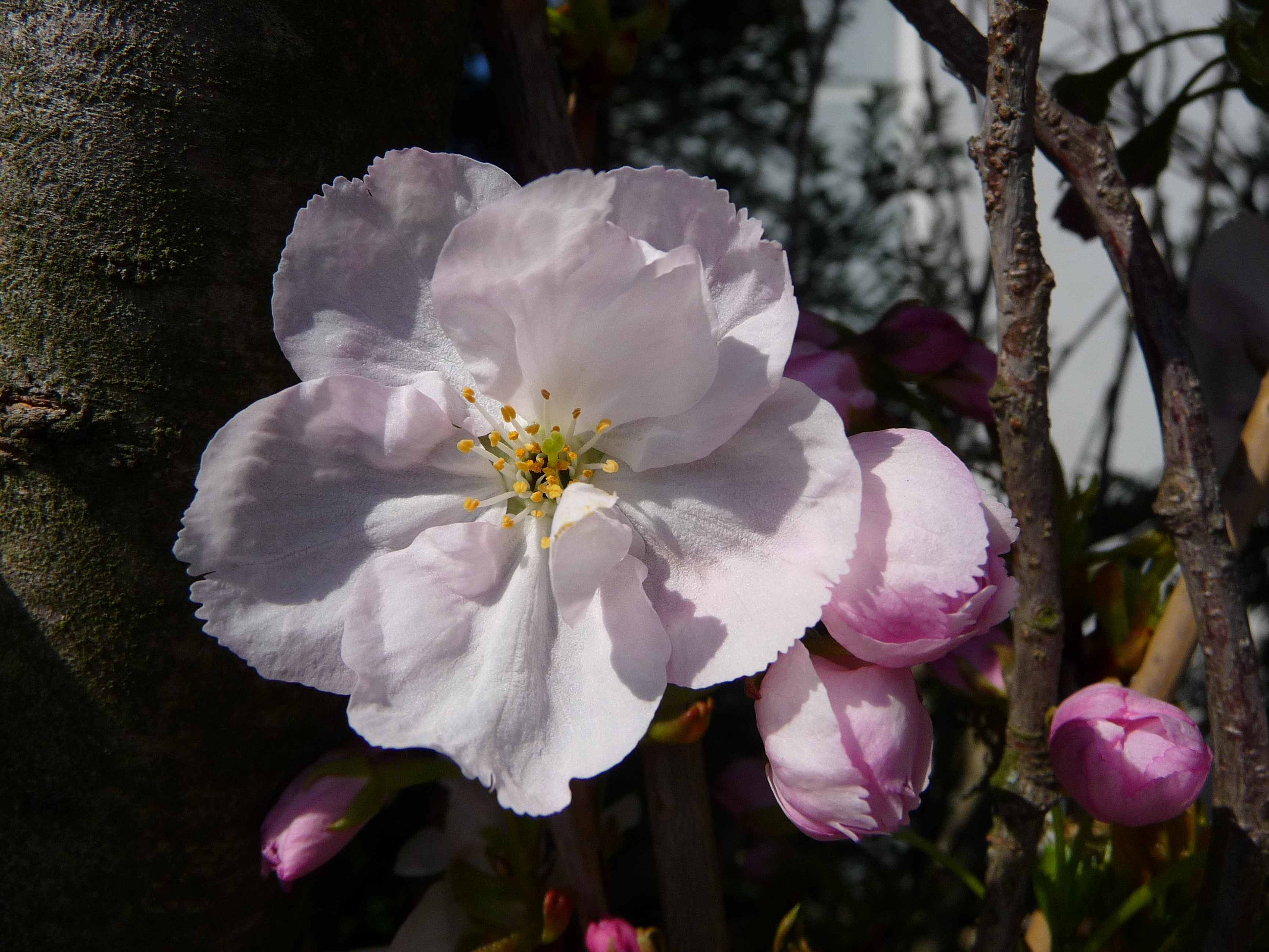 Japanische Zierkirsche (Prunus serrulata), fotografiert im nördlichen Baden-Württemberg (Deutschland)